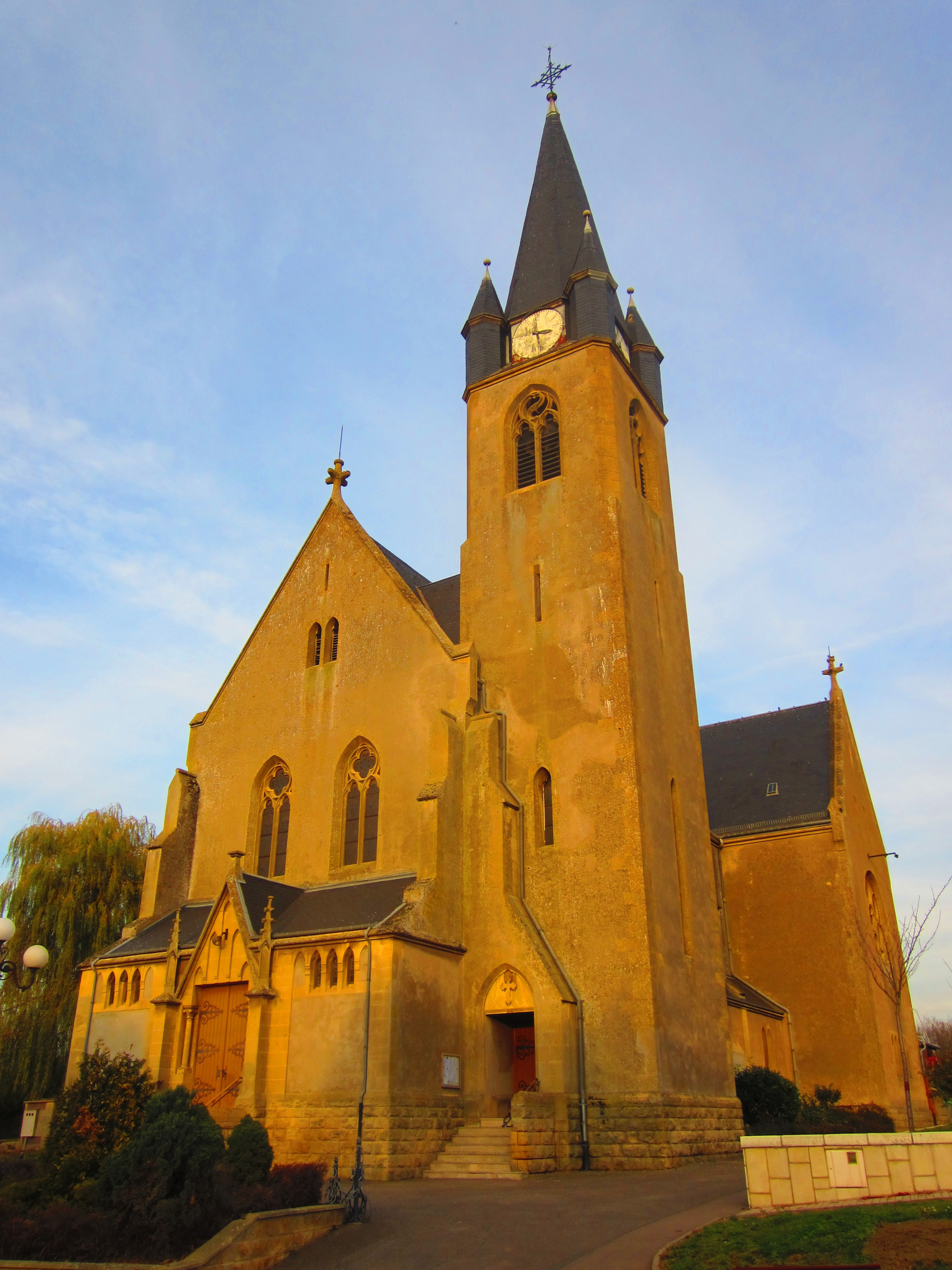 Description eglise Distroff eglise Distroff